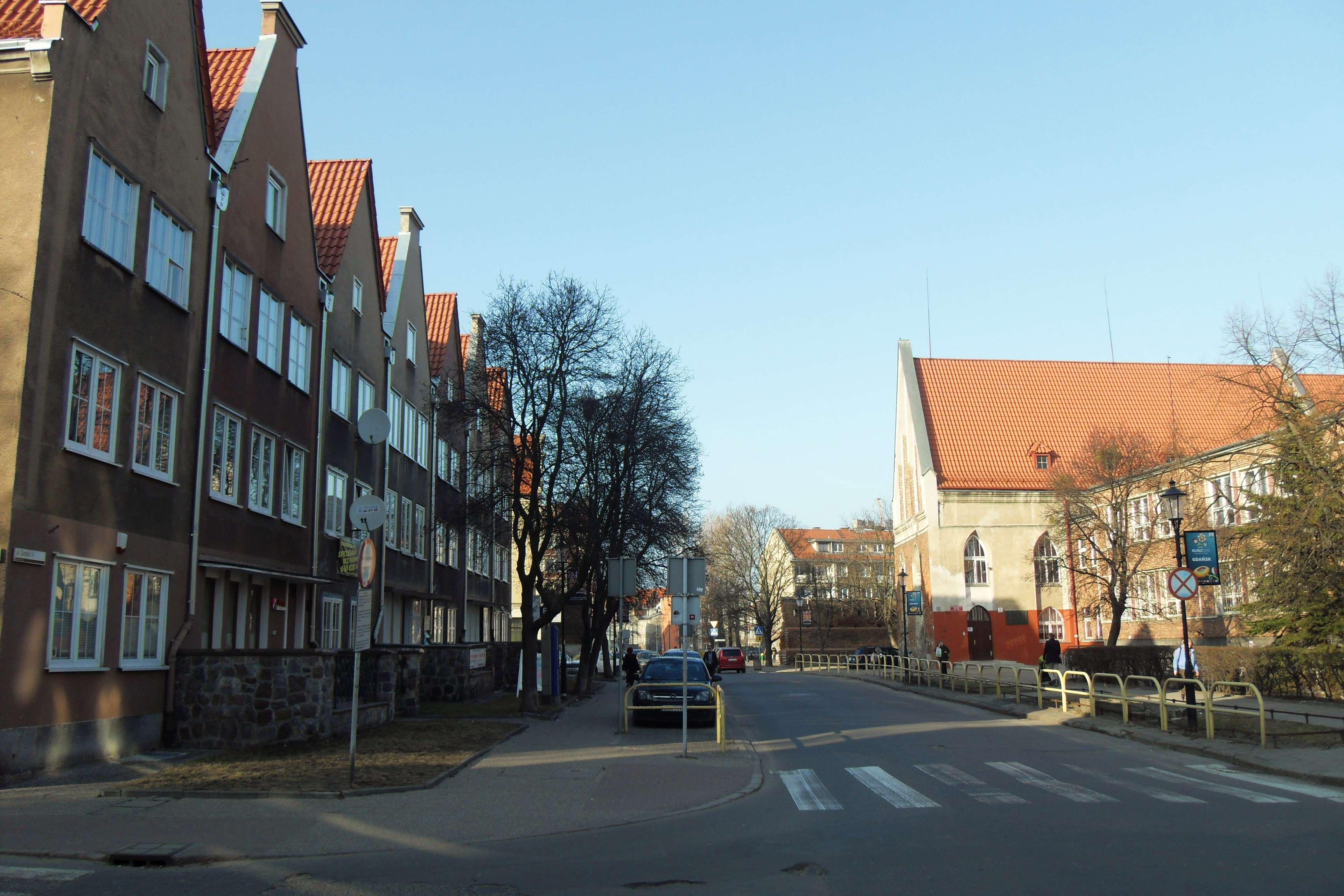 Gdańsk Główne Miasto, ul. Grobla IV.